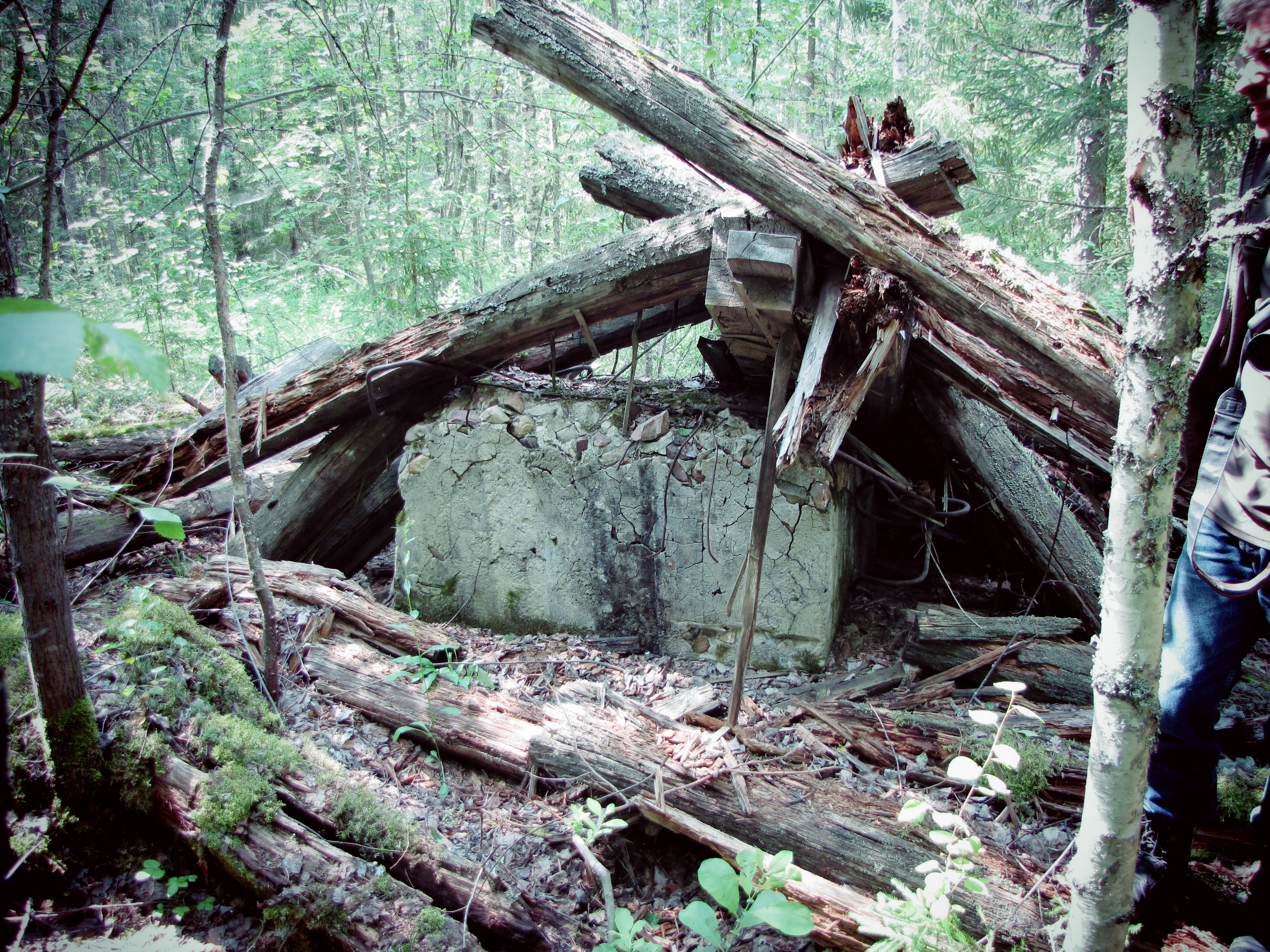 развалины здания, комплекса депо на участке " Биржа "